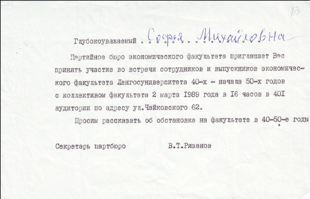 Приглашение С.М. Фирсовой на встречу сотрудников и выпускников экономического факультета ЛГУ. Март 1989, Ленинград. В приглашении Фирсову просят рассказать об обстановке на факультете в период "Ленинградского дела". Софья Михайловна Фирсова (1919-1999), преподаватель двух ленинградских вузов, в том числе и ЛГУ, была арестована 13.07.1949 по так наз. "Ленинградскому делу", обвинялась в "участии в троцкистско-сионистской организации ЛГУ". Постановлением ОС НКВД приговорена по ст. 58-10 УК РСФСР к 10 годам ИТЛ. С 1950 по 1954 отбывала срок в Минлаге (Инта, Коми АССР). Освобождена 05.10.1954 по амнистии с сокращением срока до 5 лет, вернулась в Ленинград. После 1956 смогла вернуться к преподавательской работе. Документ хранится в Научно-информационном центре "Мемориал" (Санкт-Петербург). (Фотофиксация 05.02.2012.)